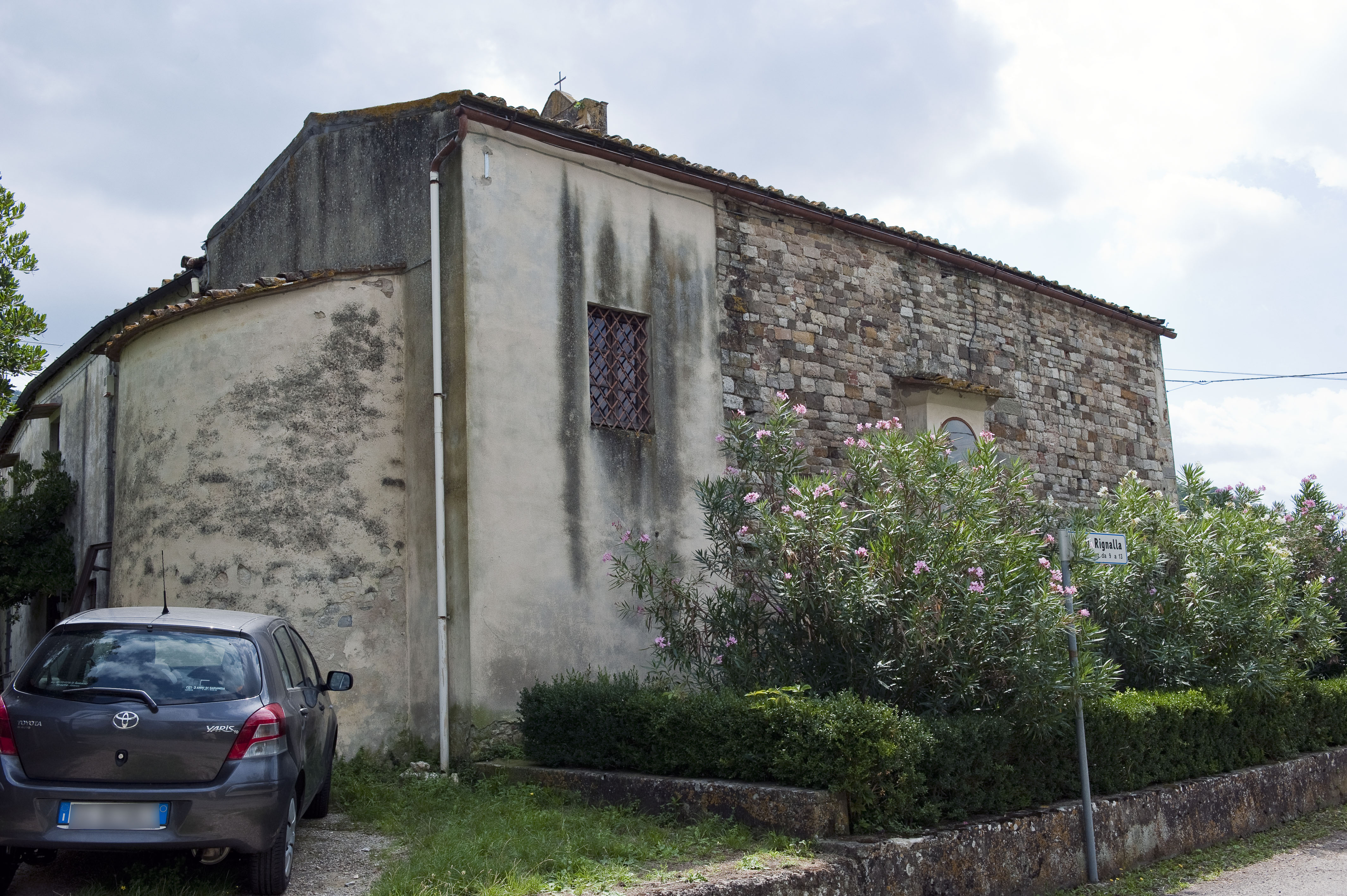 fronte posteriore della chiesa di Santa Maria a Rignalla (Bagno a Ripoli)